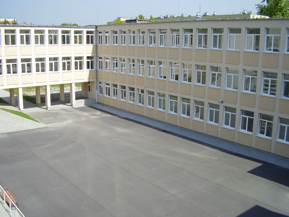 A kazincbarcikai Árpád Fejedelem Tagiskola belső udvara